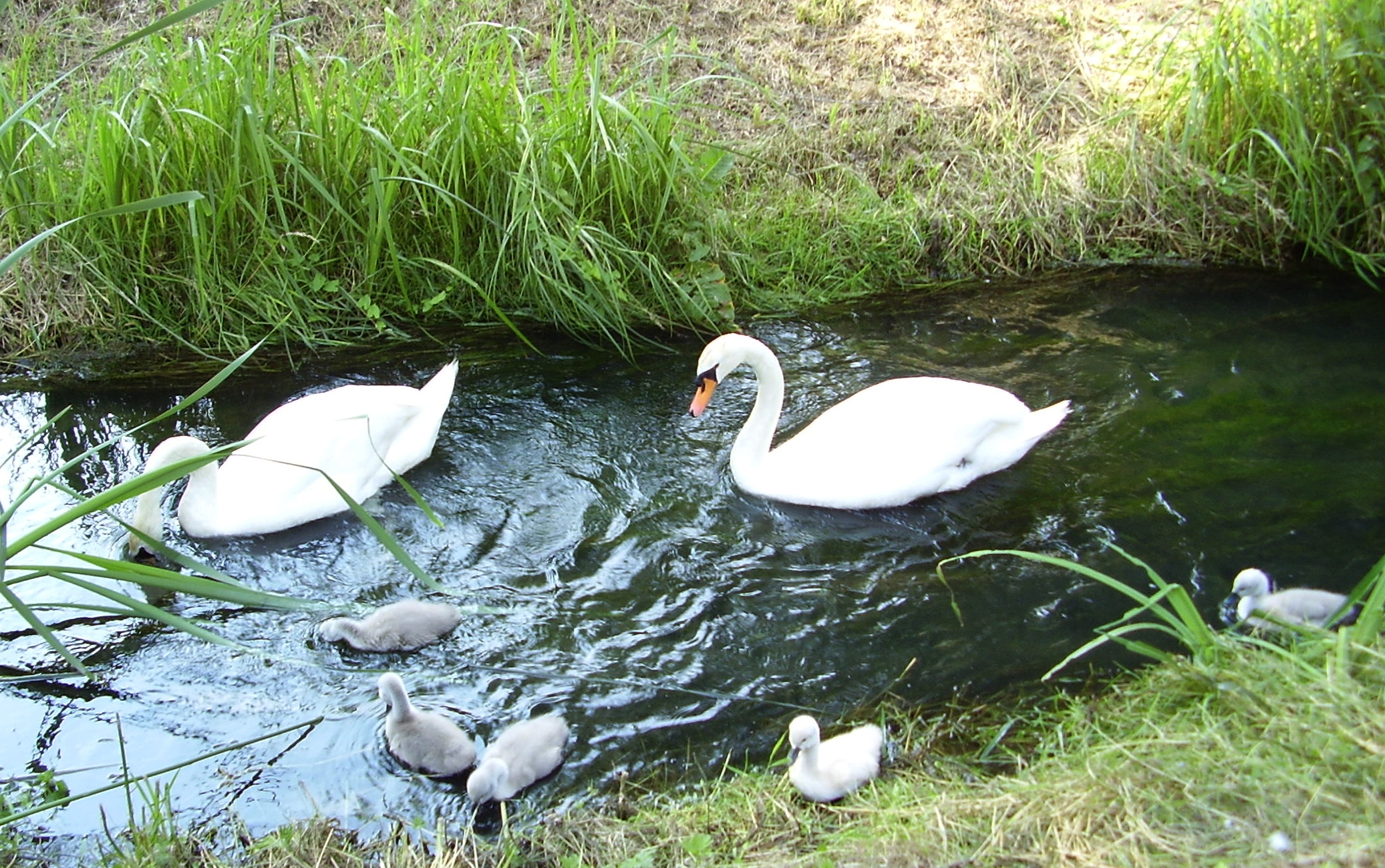 Description: Famille de cygnes sur la Woluwe, Woluwe-Saint-Lambert, Bruxelles Juin 2006 Author: User:Ben2 Date of creation: 29 juin 2006 Source: Photo personnelle